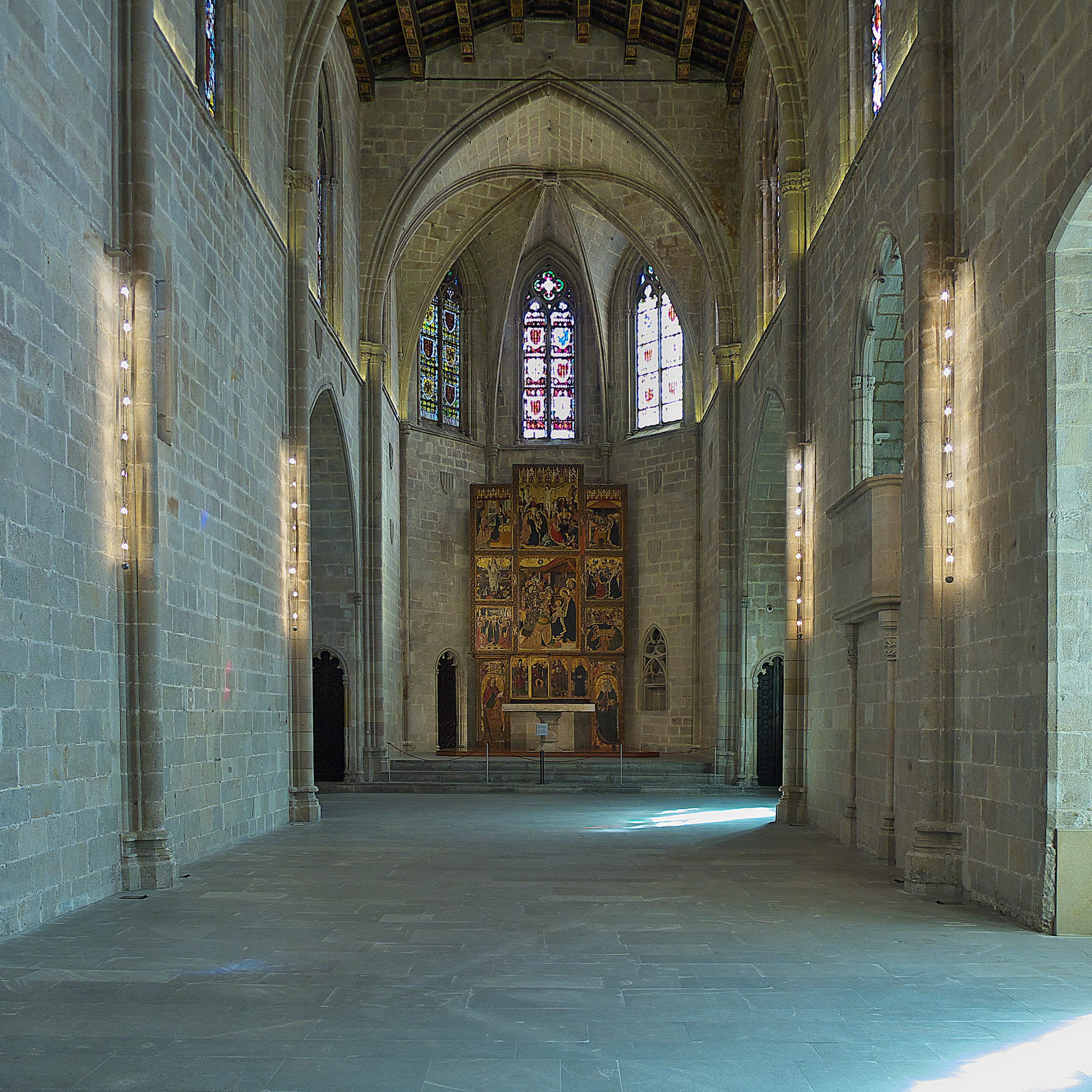 Construída durante la primera mitad del siglo XIV, siendo Pedro IV de Aragón un gran impulsor.